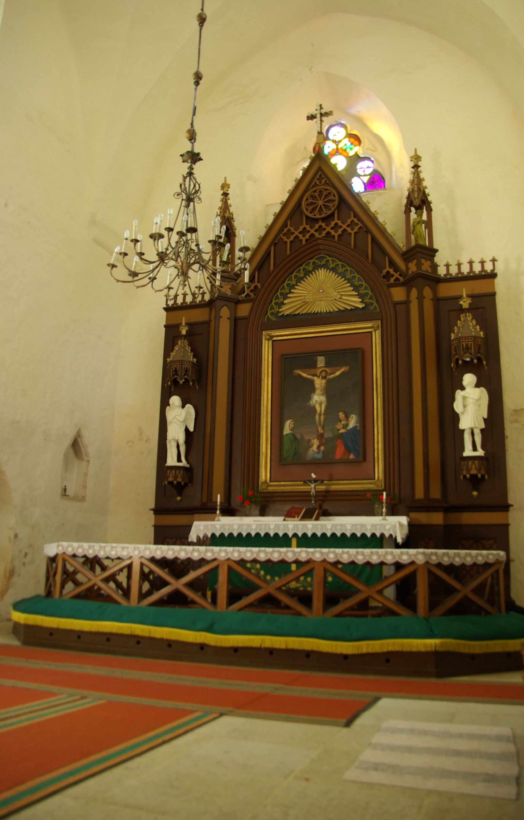 Järva maakond, Ambla vald, Ambla alevik Ambla kalmistu